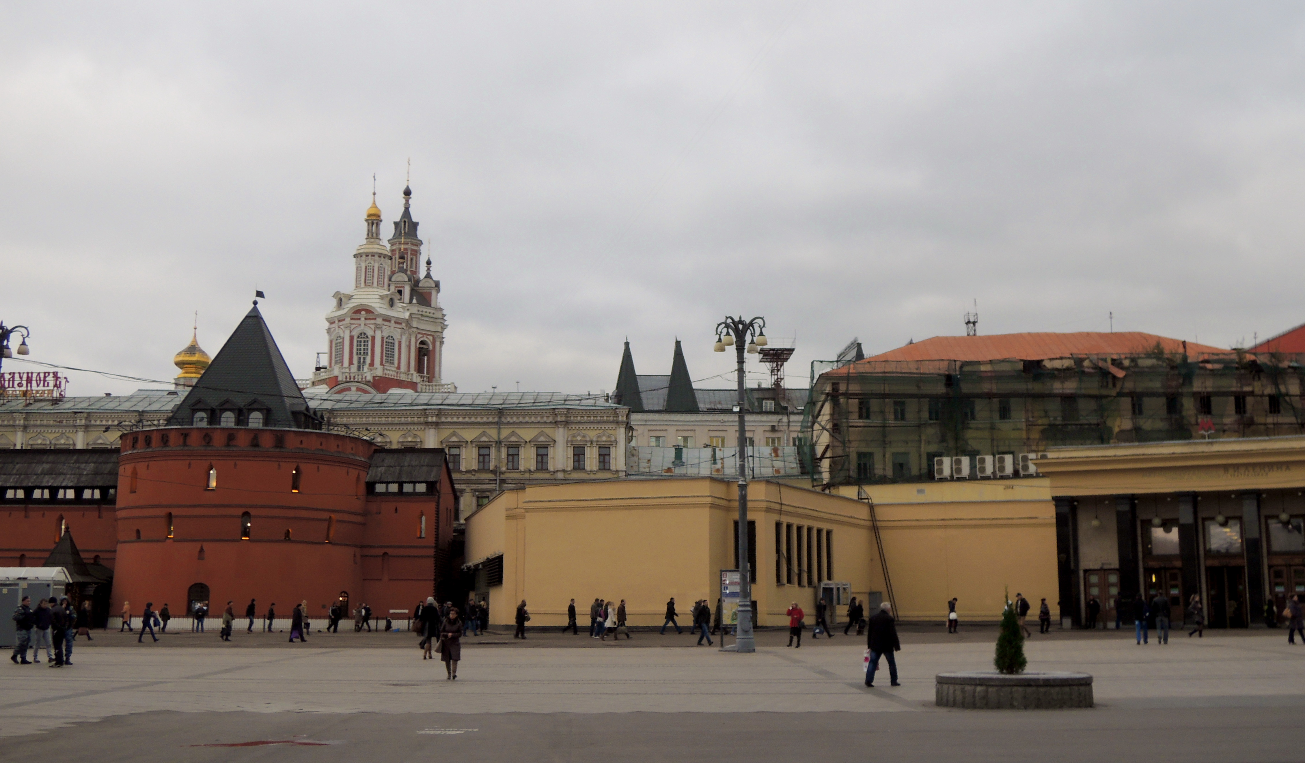 Площадь Революции (станция метро, Москва)